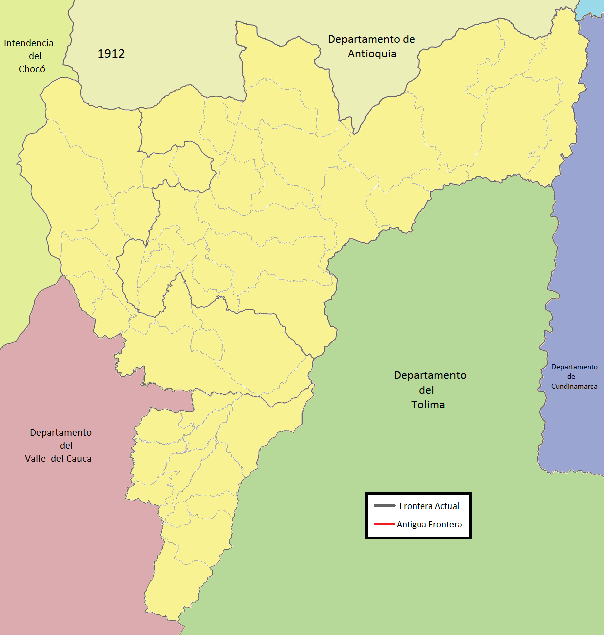 Mapa de Caldas 1912